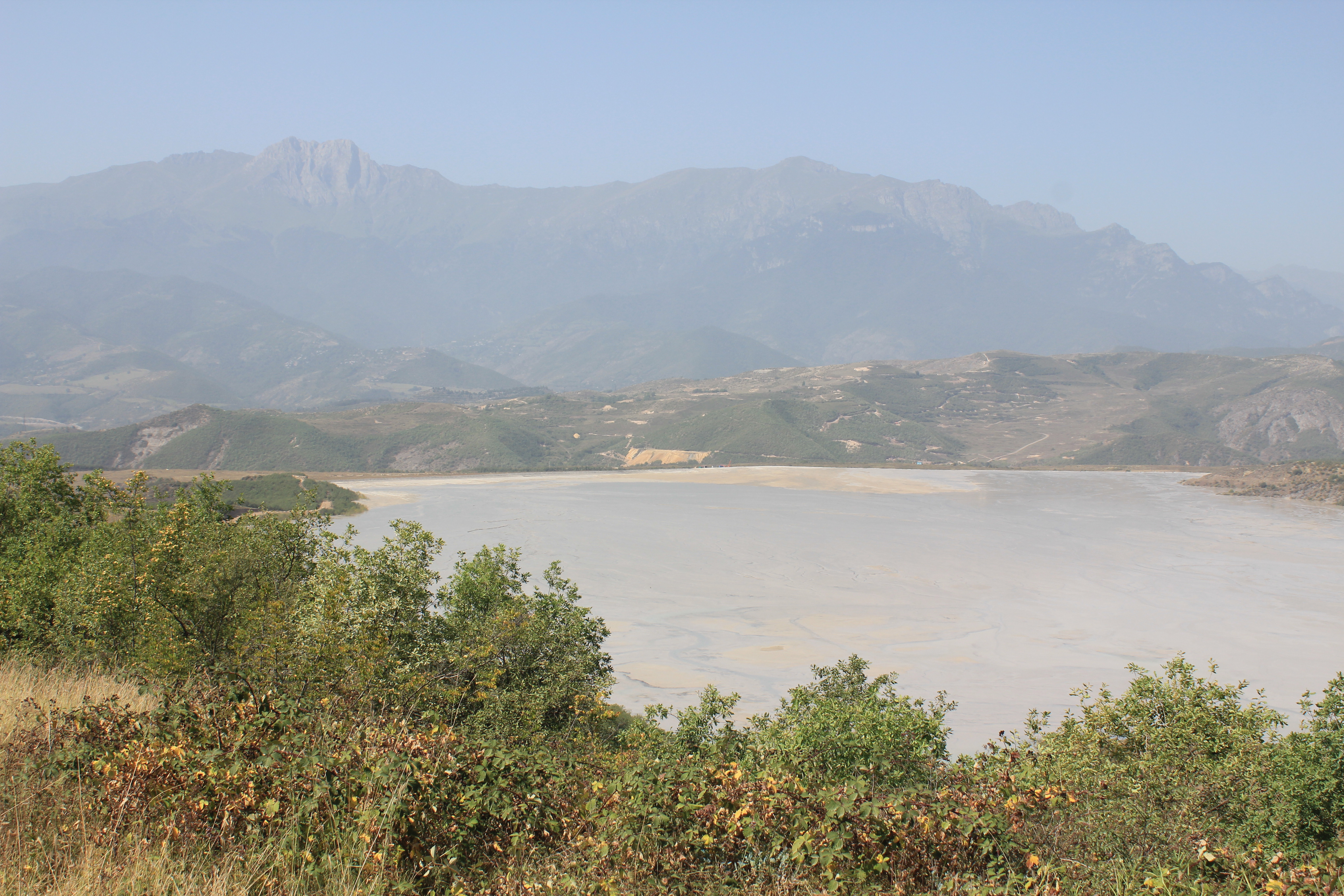 Вид на гору Хуступ